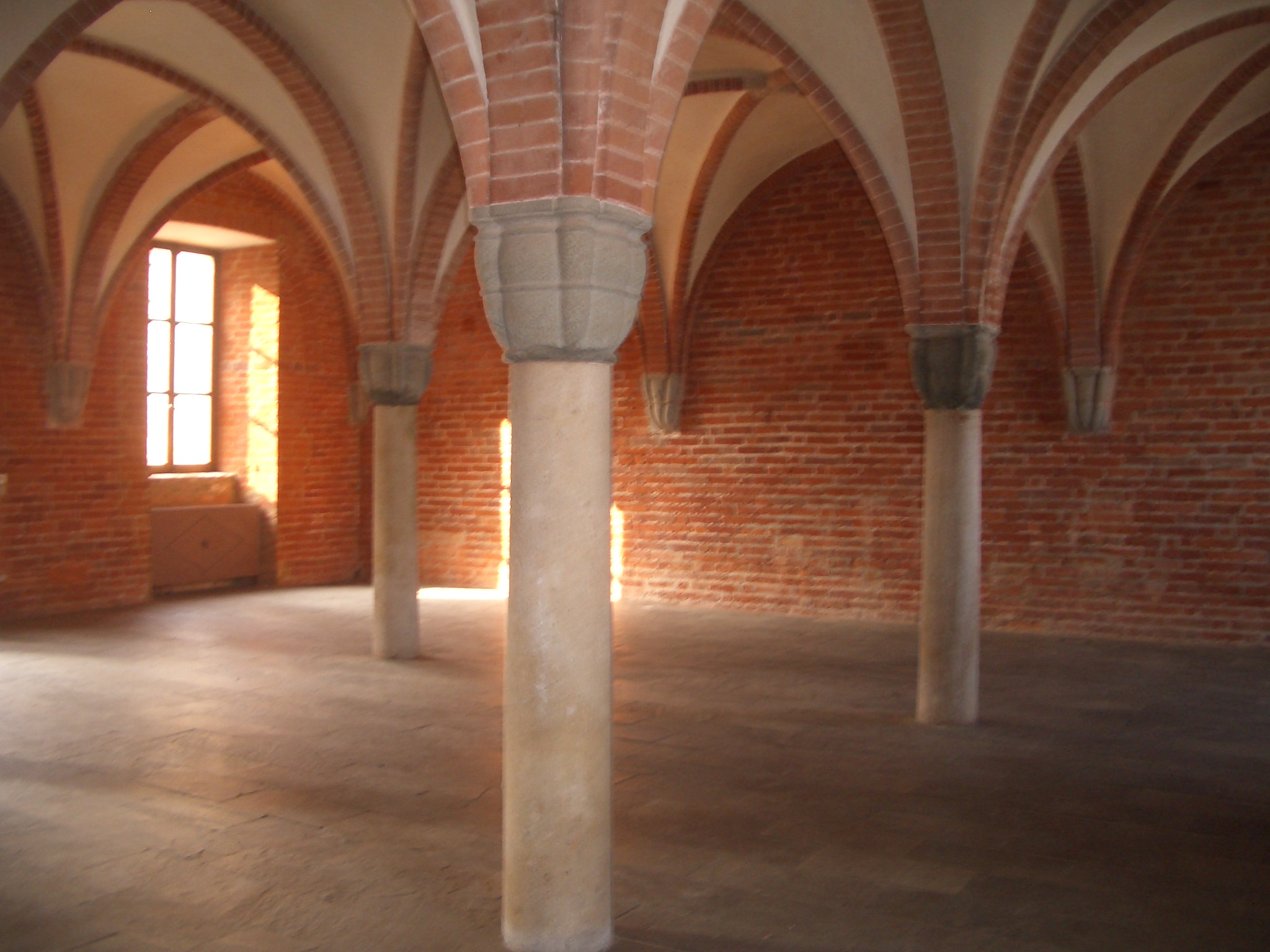 Aula capitolare, Lucedio Abbey , Trino, Vercelli, Italy